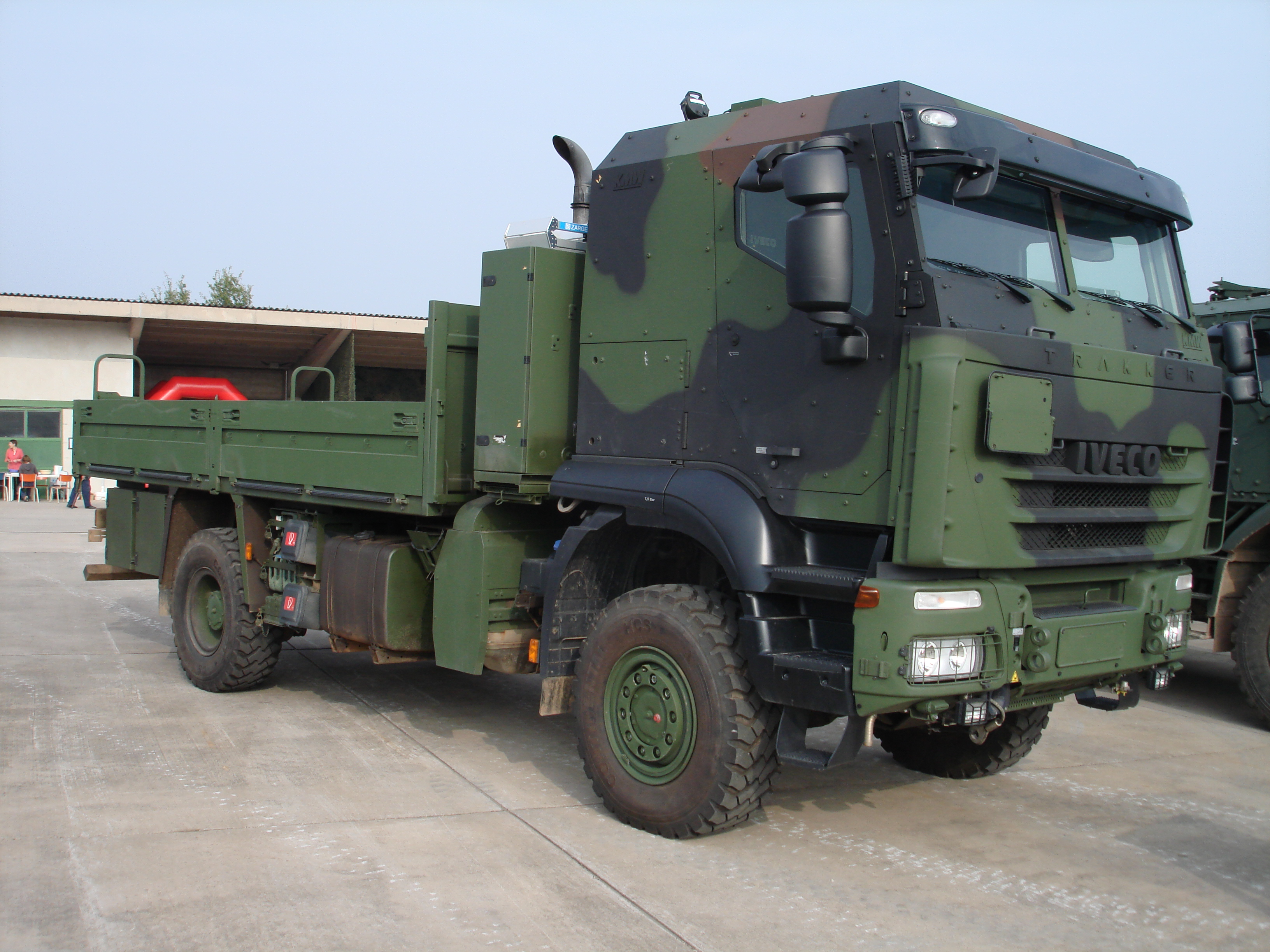 Erprobungsfahrzeug Geschützte Transportfahrzeuge (GTF), 5t-Klasse. Iveco Trakker mit geschützter Fahrgastzelle an der Wehrtechnischen Dienststelle 41. Ausgestellt zum Tag der offenen Tür 2009.